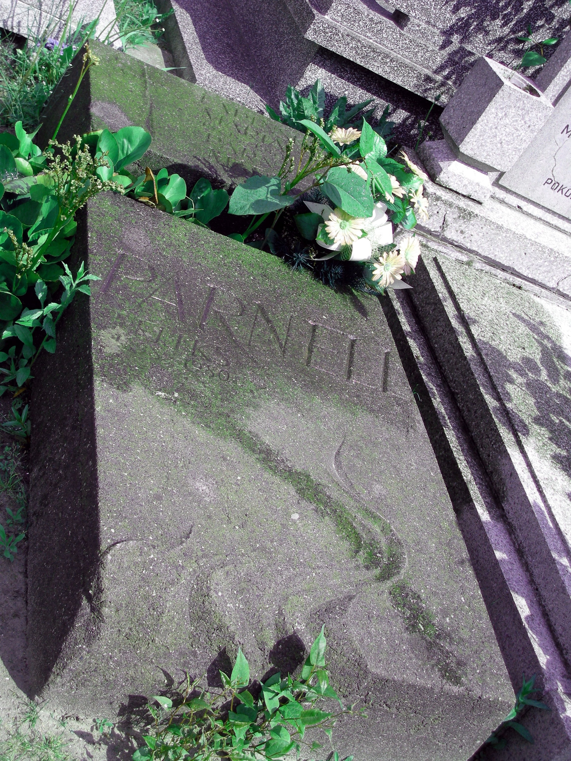 Nagrobek Feliksa Parnella (1898-1980) tancerza i choreografa na łódzkim cmentarzu św. Józefa przy ulicy Ogrodowej.